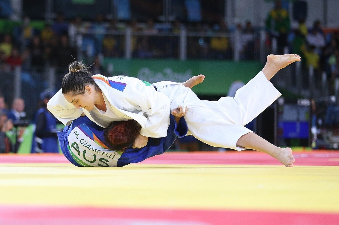 Дзюдо женщины на Олимпиаде в Рио